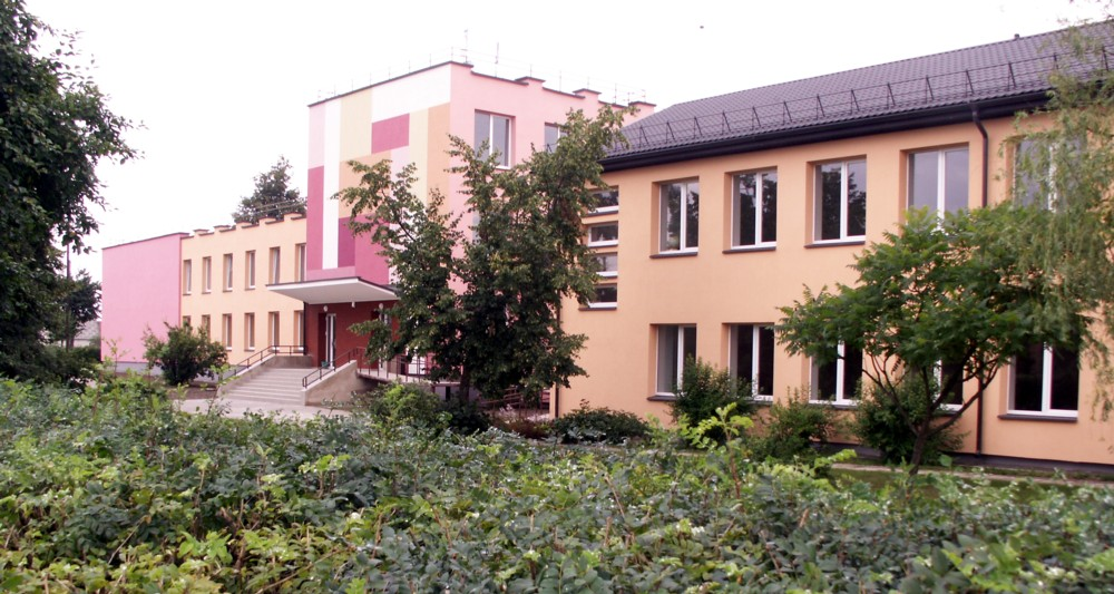 Kužių vidurinė mokykla